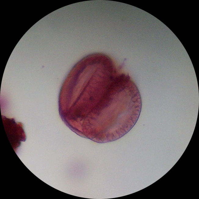 Contents 1 FR:Description 2 Summary 3 FR:Description 4 Licensing FR:Description Photographie au microscope d'un pollen pour une étude palynologique Photographe: Henri-Georges NATON Source: importé par le photographe Licence: GFDL-self A modified version is uploaded under the name: Palynologie-exemple2.jpg